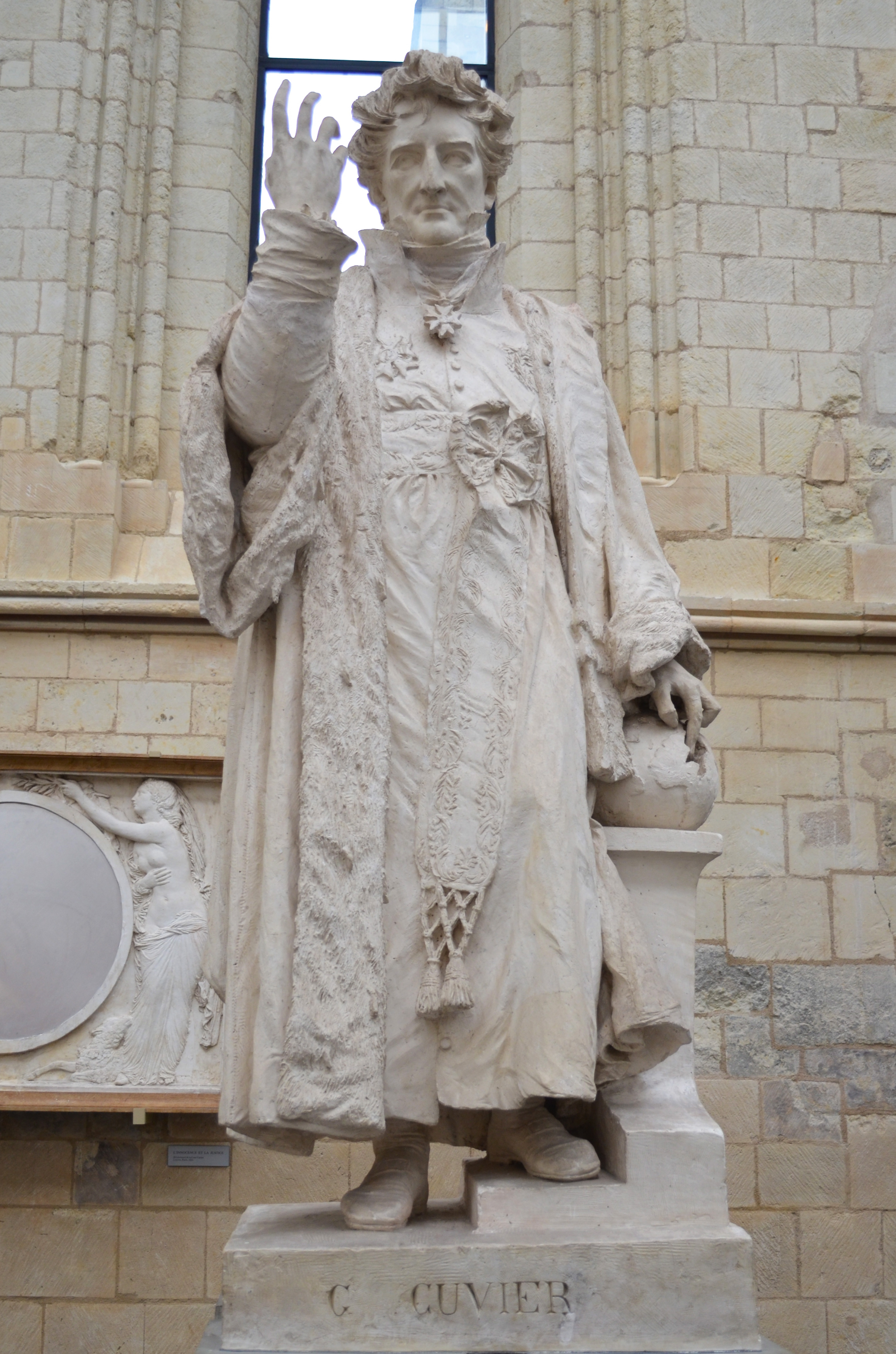 Modèle du marbre Georges Cuvier du Muséum national (Paris 1838) par David d'Angers - Musée David d'Angers - Angers (Maine-et-Loire)